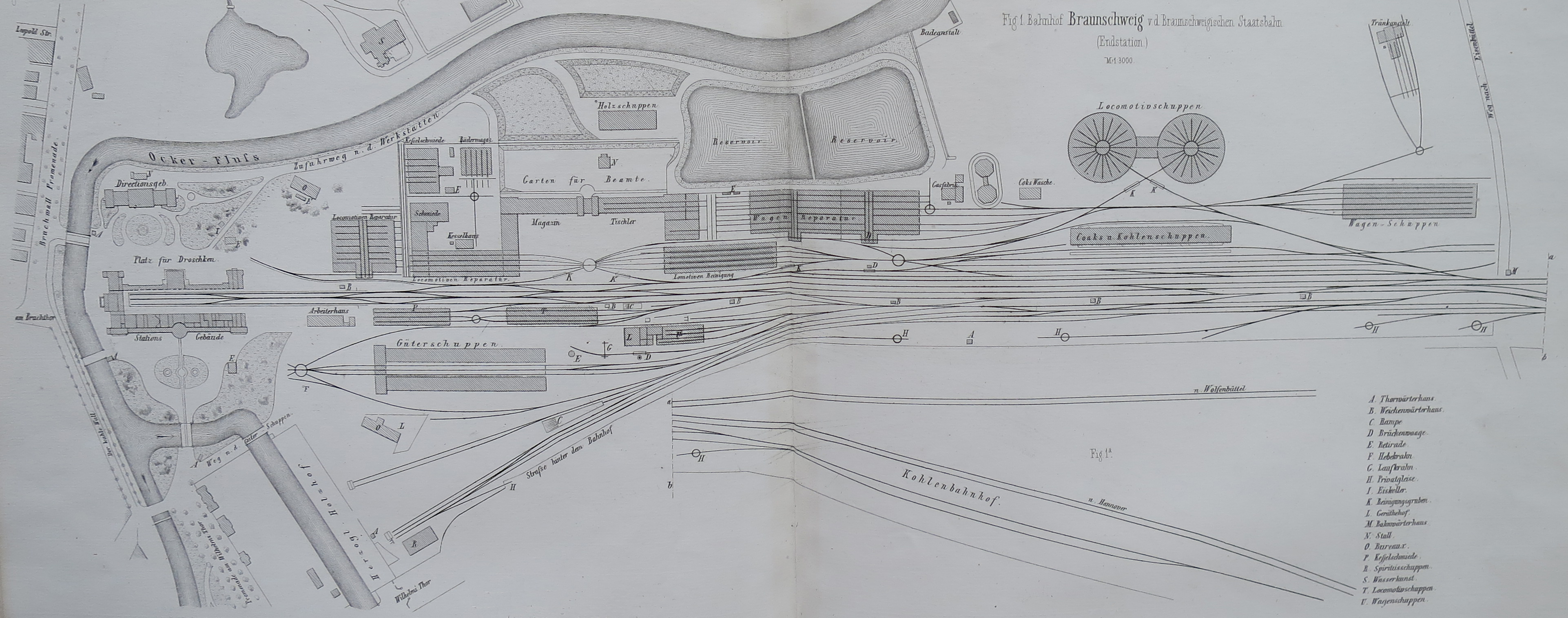 Gleisplan des Alten Bahnhofs von Braunschweig 1870